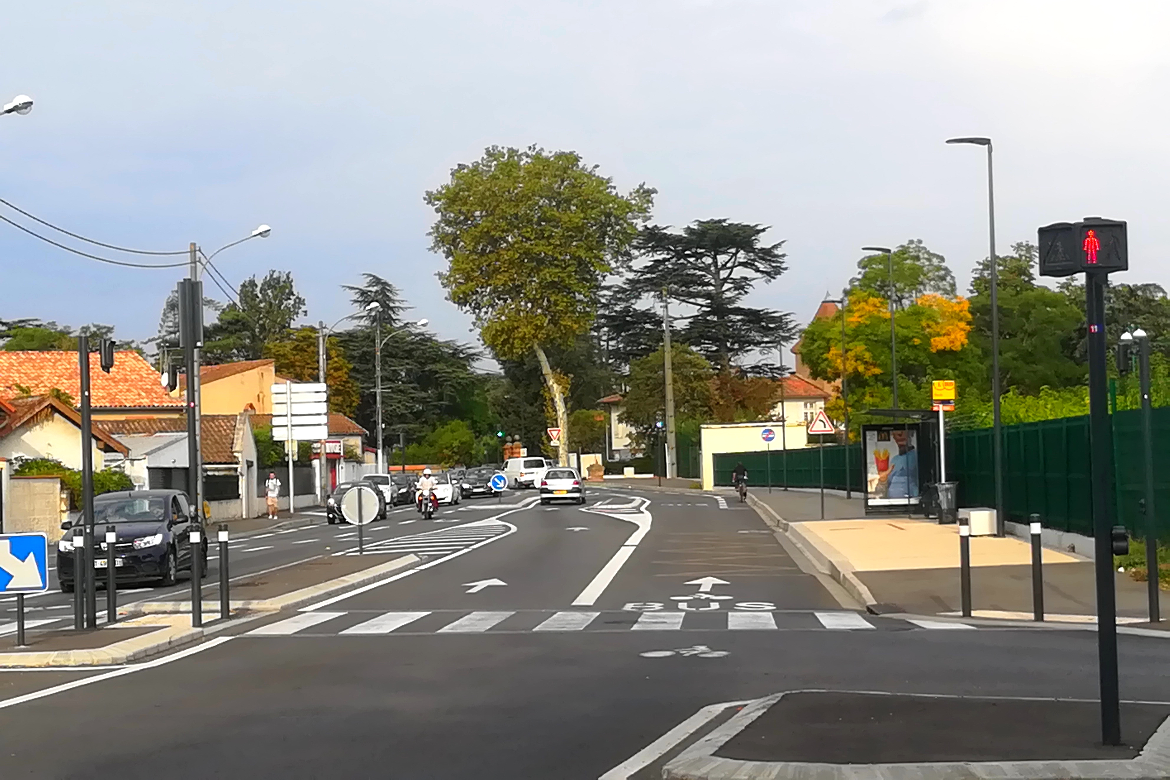 L'arrêt Tissié de la ligne de bus Linéo 3 dans le quartier de Lardenne à Toulouse.